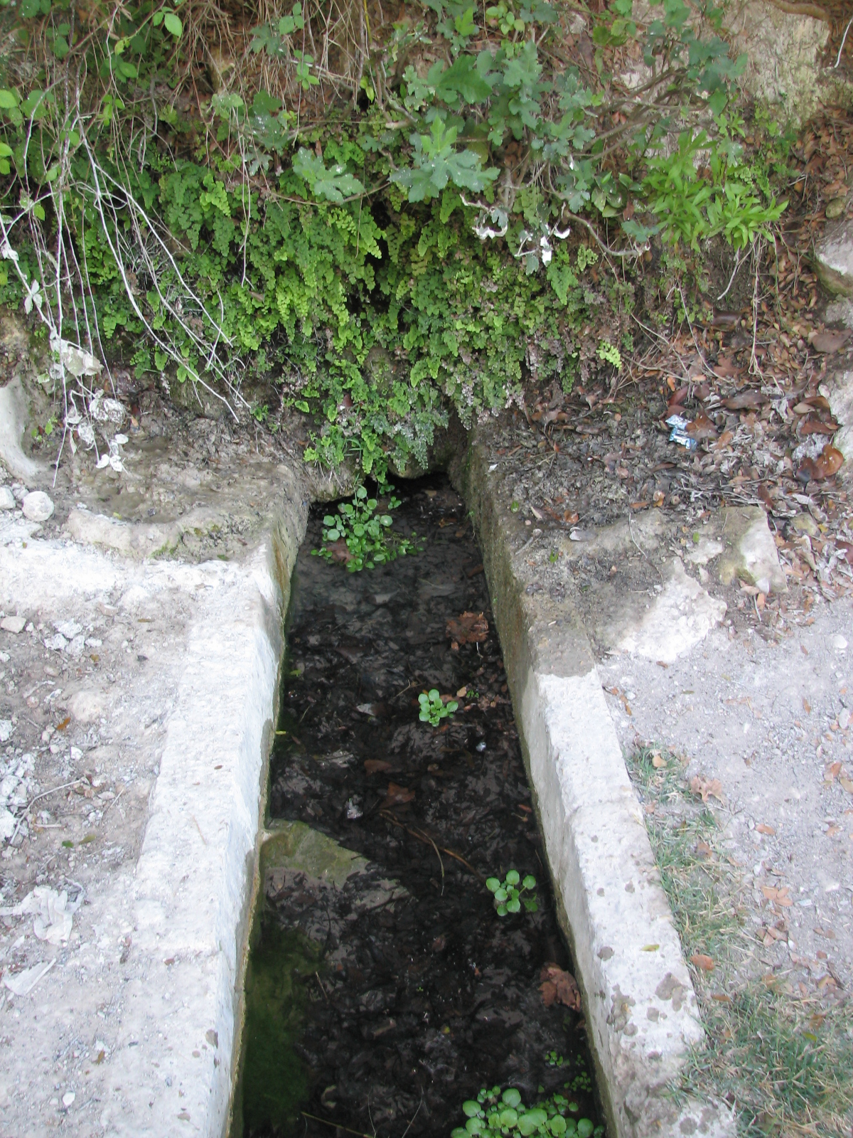 Wadi khik - Mount Carmel Part of Israel National Trail נחל חיק זורם במורדותיו המערביים של הר הכרמל. ראשית הנחל באזור הכרמל הגבוה ליד היישוב עוספיה ליד נקודת רום כרמל . הוא זורם מקו פרשת המים לכוון מערב ונשפך לנחל אורן. הנחל הוא חלק ממסלול שביל ישראל. Khik Spring מעין חיק